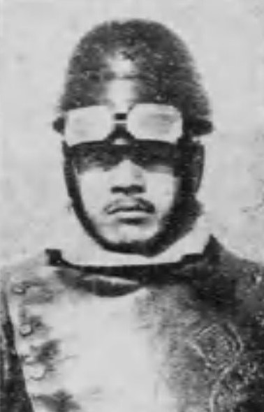 阪元守吉陸軍歩兵中尉。（埼玉県）所沢飛行場において設計製作の陸軍制式第二号機の試験飛行中大正七年（1918）一月十七日午前九時三〇分、約四〇メートルの低空より場内北格納庫の東側約百メートルの地点に墜落、即死。三二歳。佐賀市安住町石丸良太郎の次男。熊本幼年学校卒業、同市今宿裏小路元代議士坂元規貞の養子となり長女と結婚。明治四三年（1910）士官学校卒業、大正元年（1912）飛行将校を志願、六月気球隊付を拝命、二年（1913）六月飛行免状を得、三年（1914）四月飛行術研究のためドイツ留学、十月帰朝。爾来交通兵団司令部付気球研究会委員として飛行機製作主任として所沢に在住。